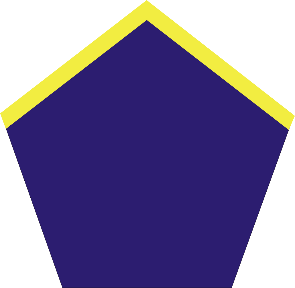 Patka piechoty (na kołnierz) wprowadzona w Wojsku Polskim w Anglii w 1941